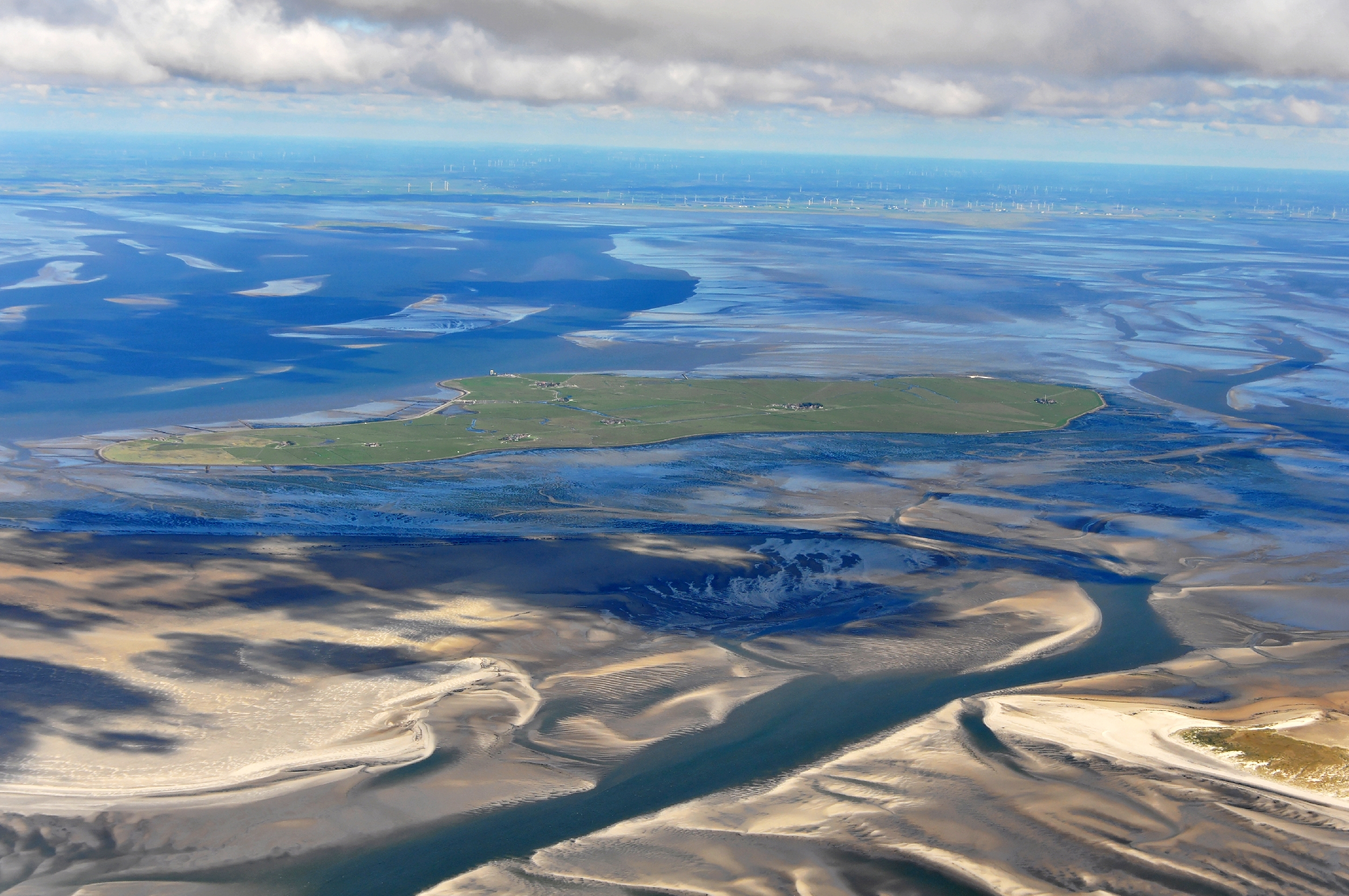 Luftaufnahmen Nordseeküste 2013-09: Hallig Hooge